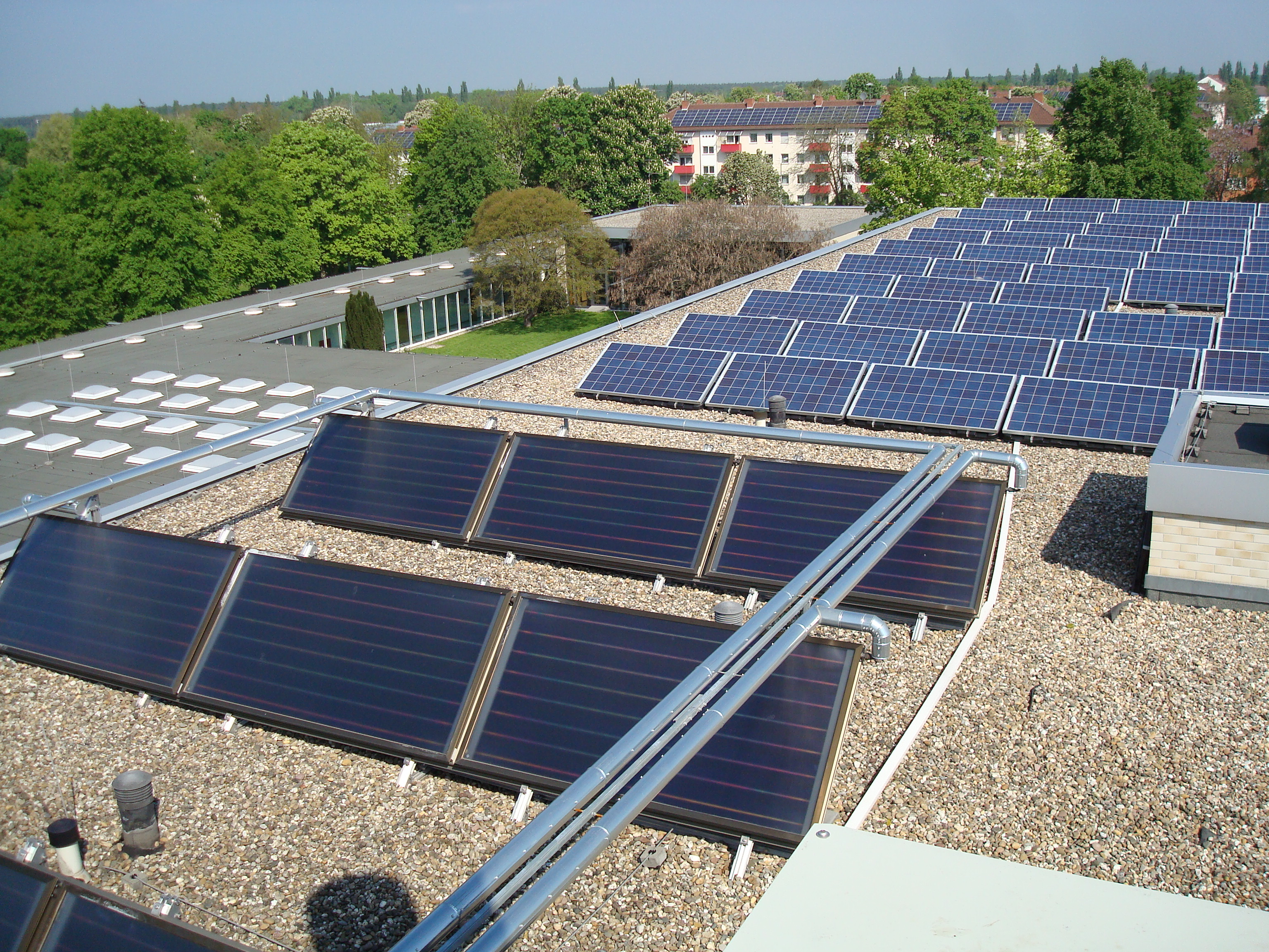 Universität Speyer, Freiherr-vom-Stein-Str. 2: Dach des Gästehauses Freiherr vom Stein - Solarthermie und Photovoltaik